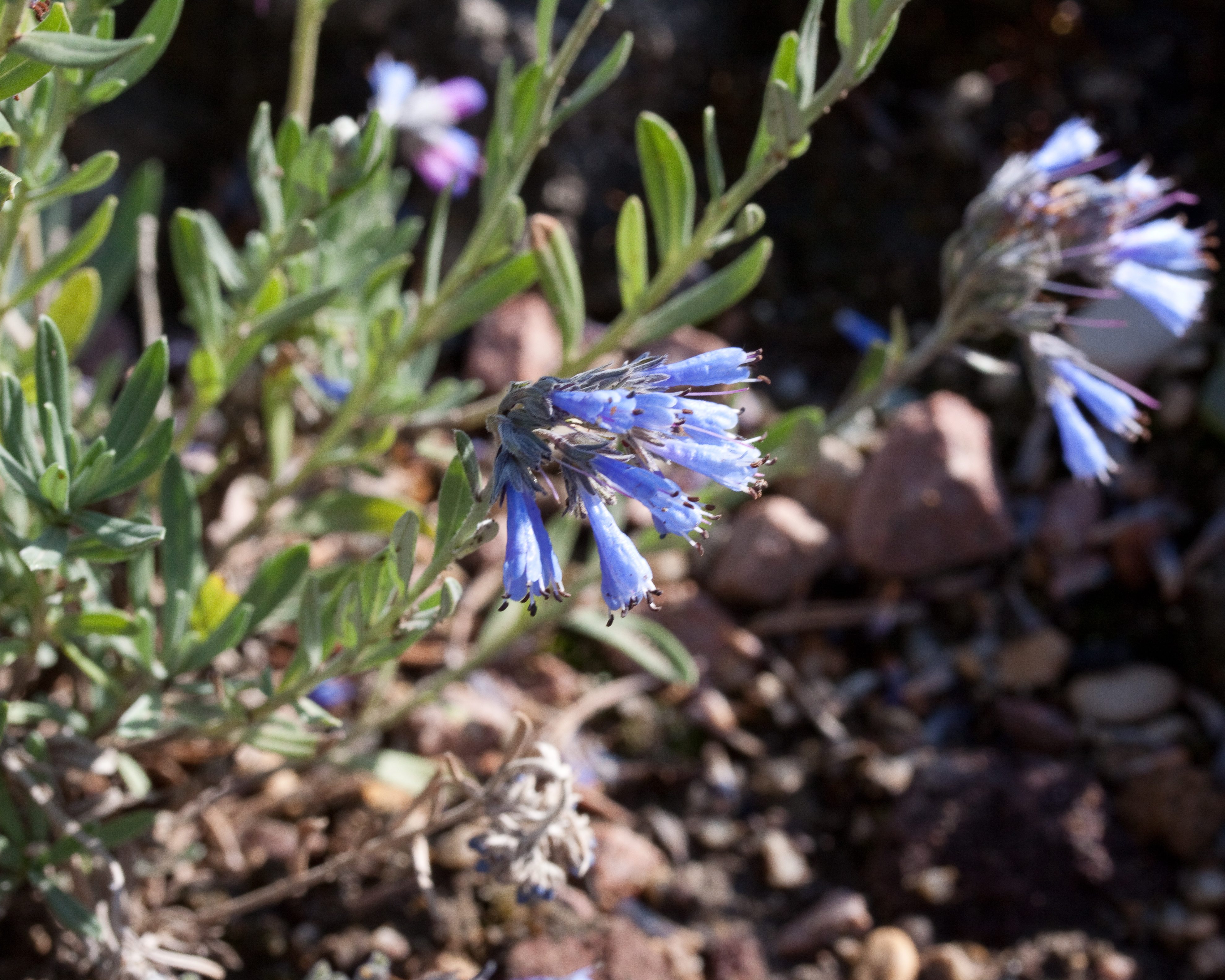 Fleurs de Moltkia suffruticosa - Jardin des Plantes - Paris - France